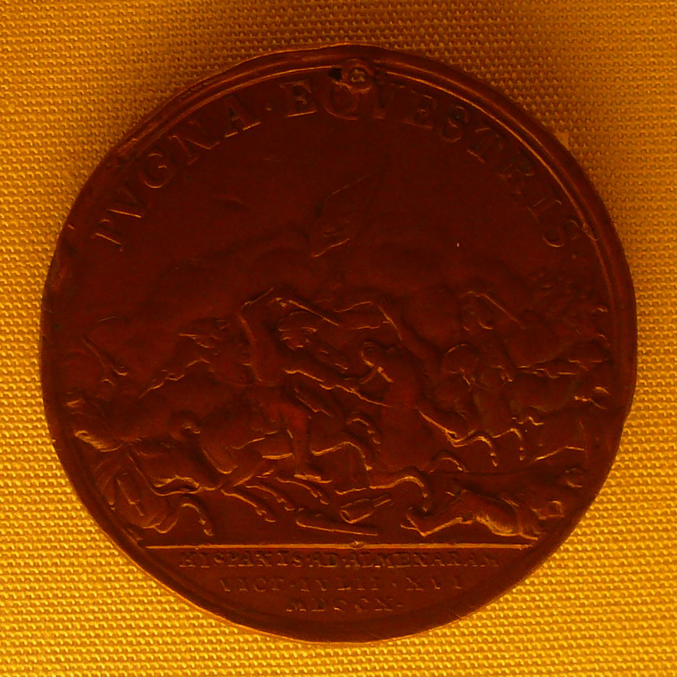 Medalla commemorativa. Col·lecció de numísmàtica del Museu Nacional d'Art de Catalunya.